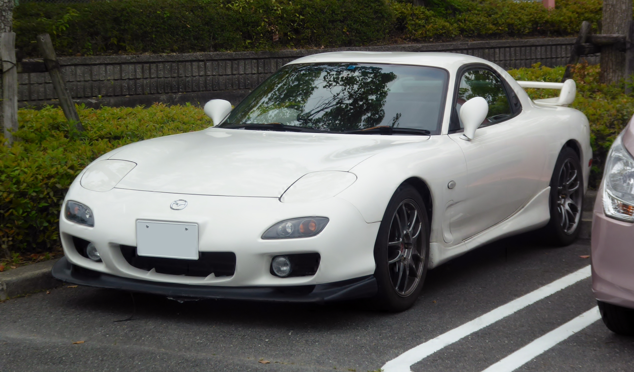 チューニングされたGF-FD3S型マツダ・RX-7タイプRBをフロントから撮影。